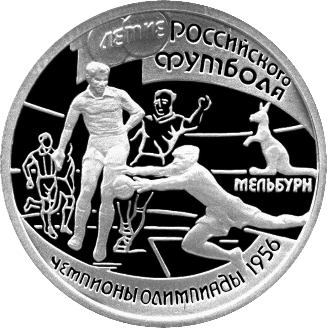 Монета Банка России — 100-летие Российского футбола,0021, 1 рубль